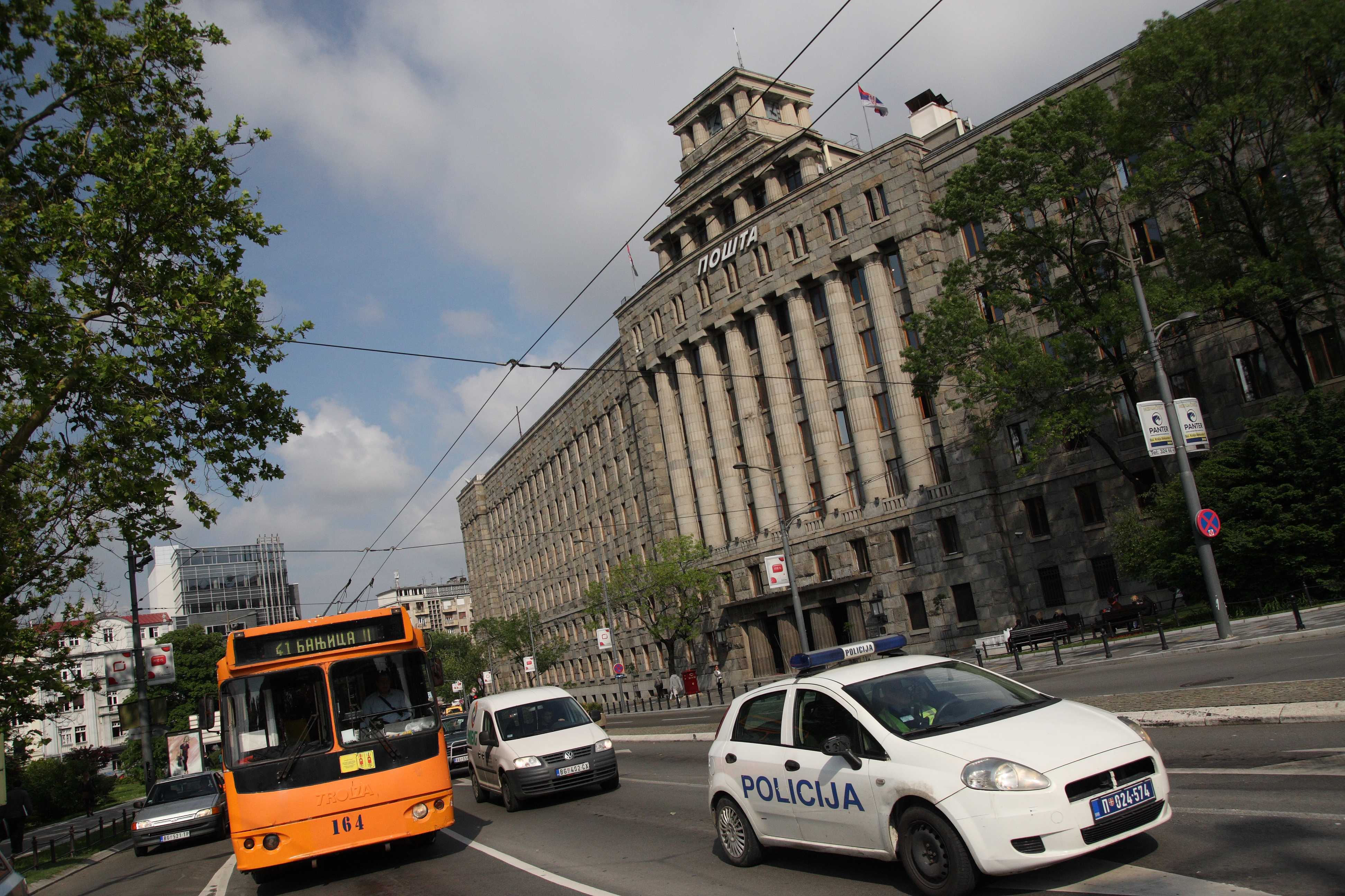 Belgrade, Serbia